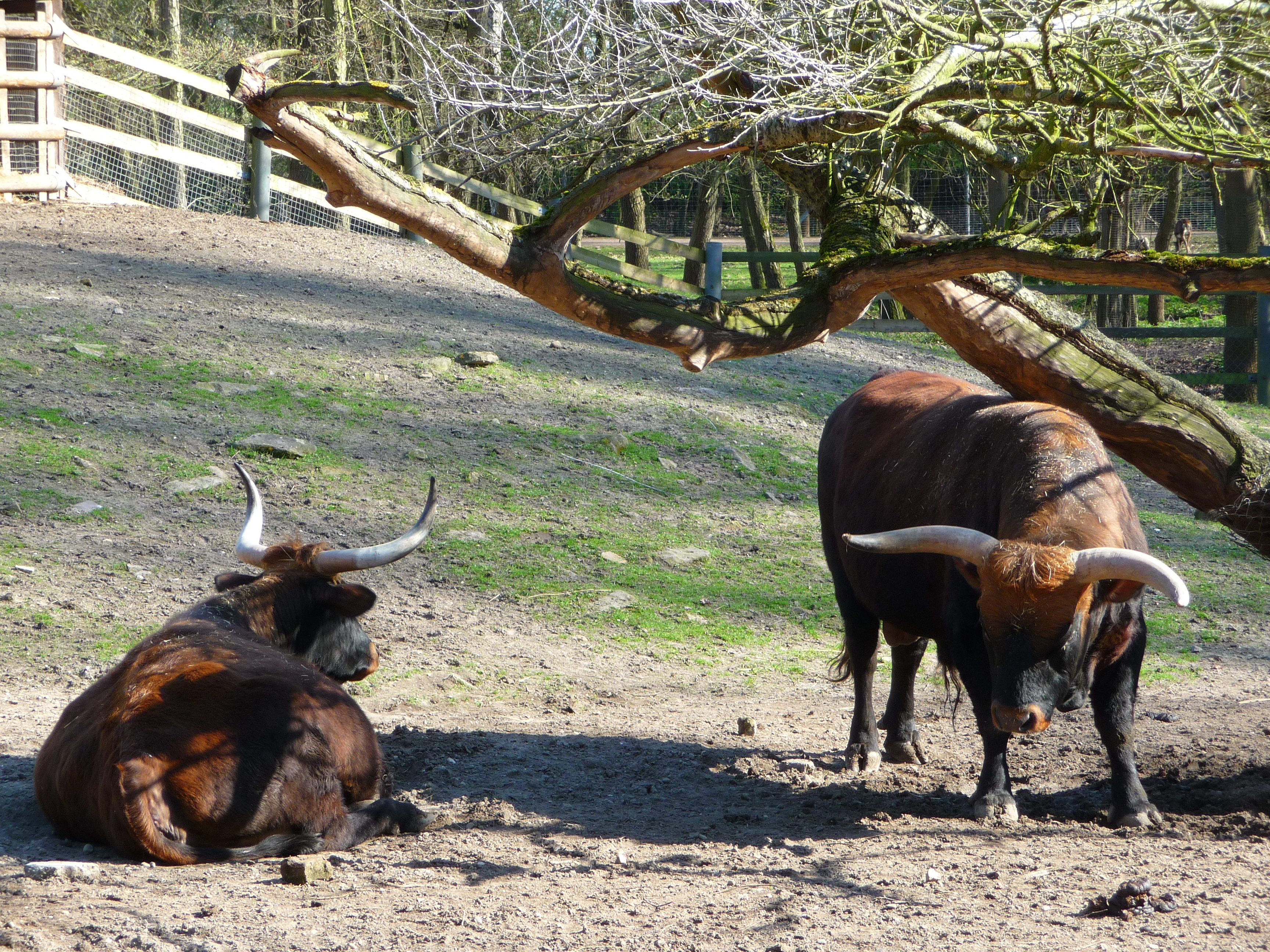 Rückzüchtung Auerochse, fotografiert im Wildpark Ludwigshafen-Rheingönnheim (Rheinland-Pfalz, Deutschland)